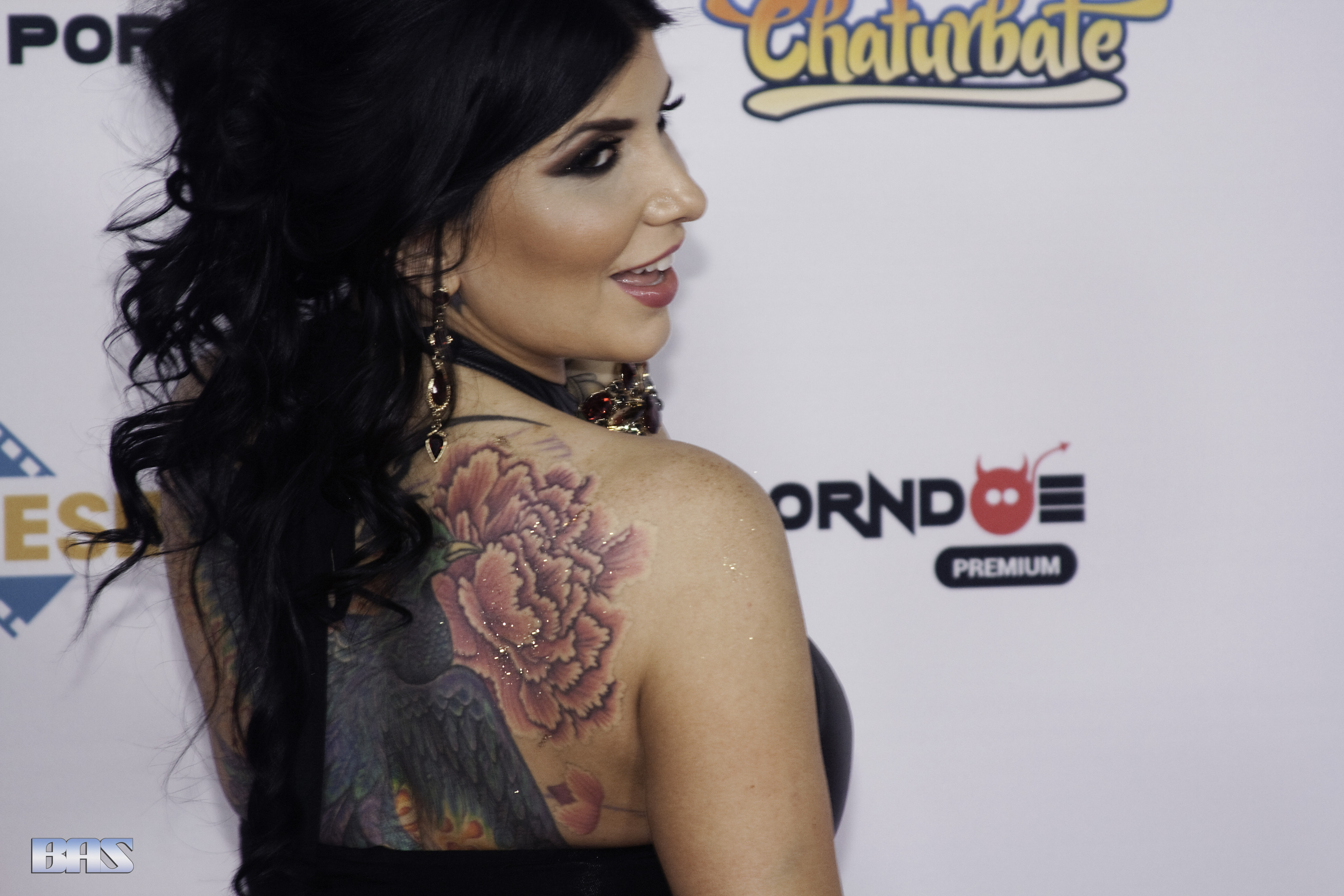 AVN16_0866bas